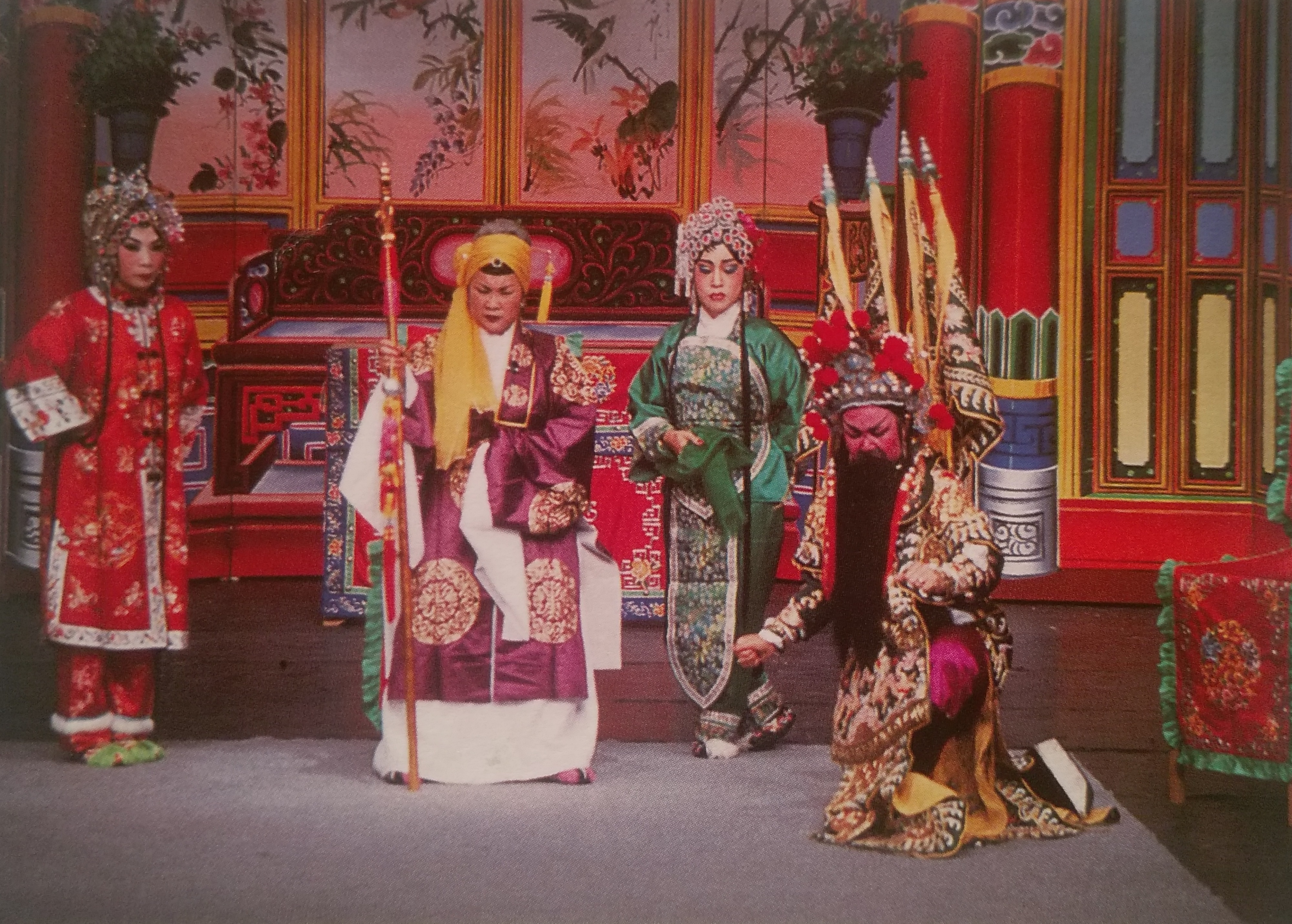 中文（台灣）: 高甲戲《興漢圖》劇照，由彰化員林生新樂九甲劇團演出